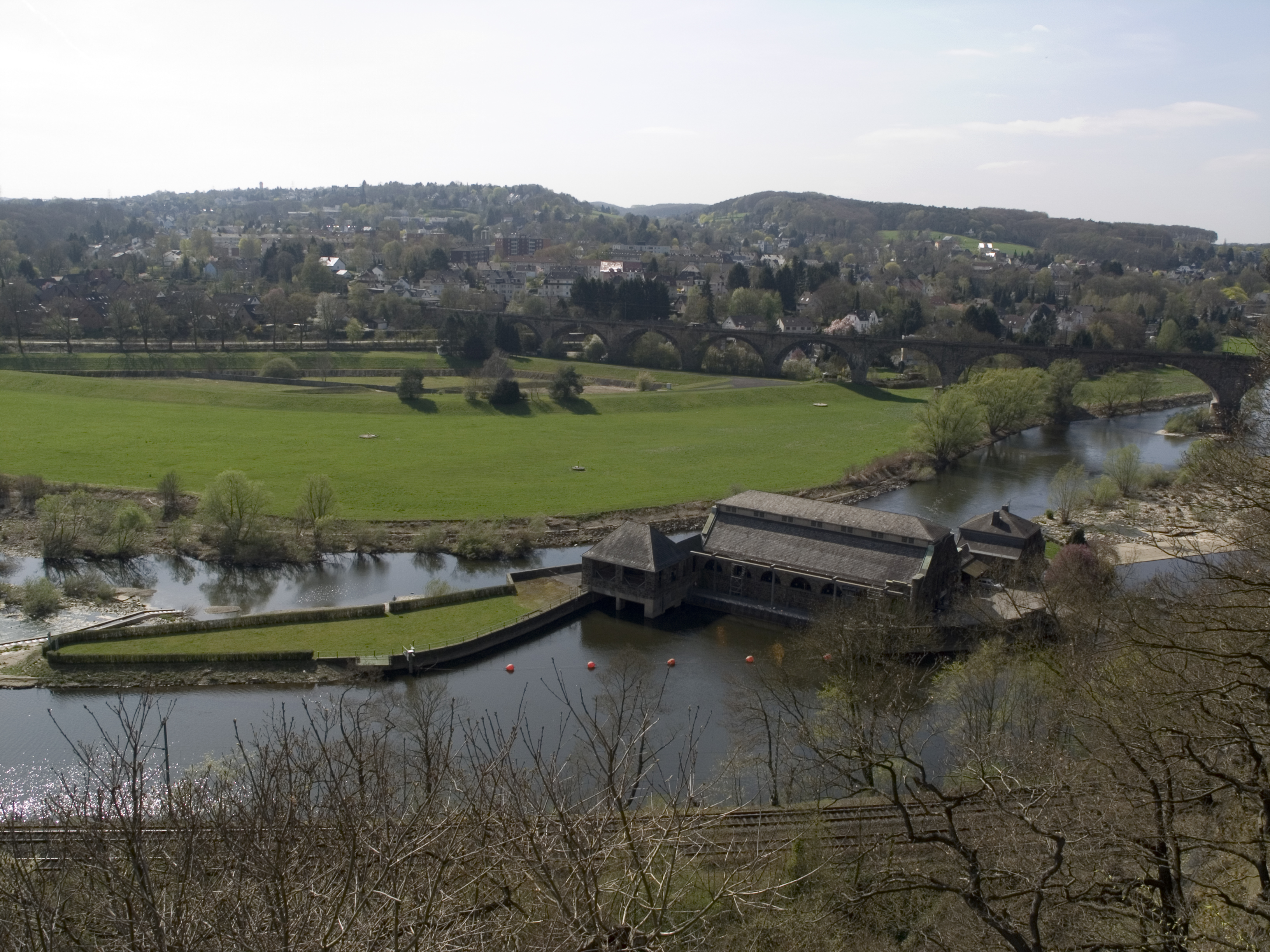 Северный Рейн - Вестфалия, Виттен - монумент Бергера (вид на Рур)